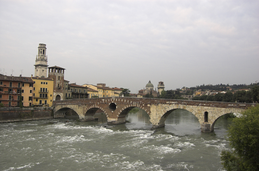 Il romano ponte Pietra a Verona